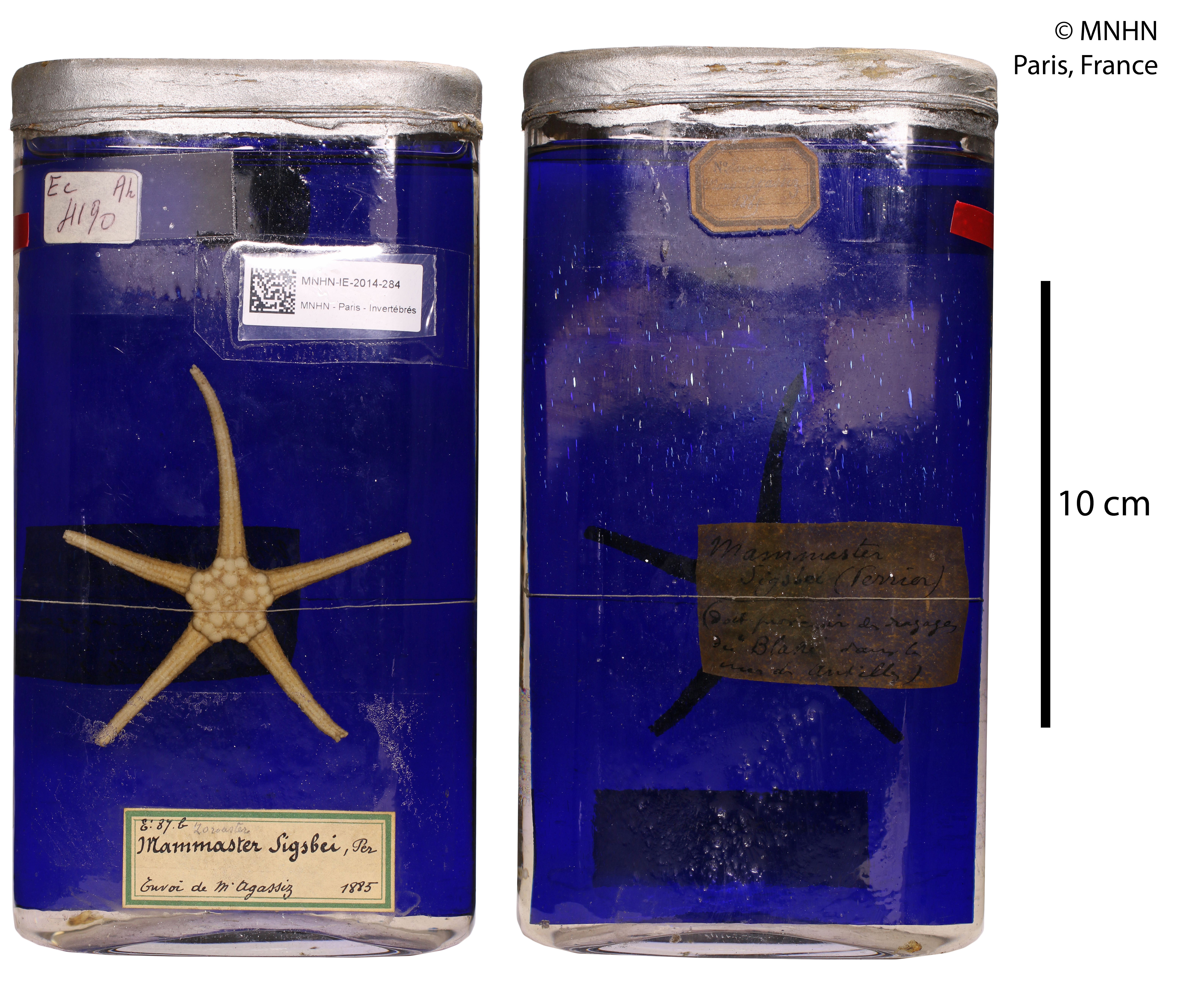 Cnemidaster sigsbeeiSpécimen MNHN-IE-2014-284, sous la dénomination Zoroaster sigsbeei Perrier, 1881Collection : Échinodermes (IE)Muséum National d'Histoire Naturelle (Paris, France). Origine : Localité/Lieu-dit : Mers des Antilles ? Expédition : U.S. coast survey steamer "Blake" Navire : Blake Numéro de station : no data